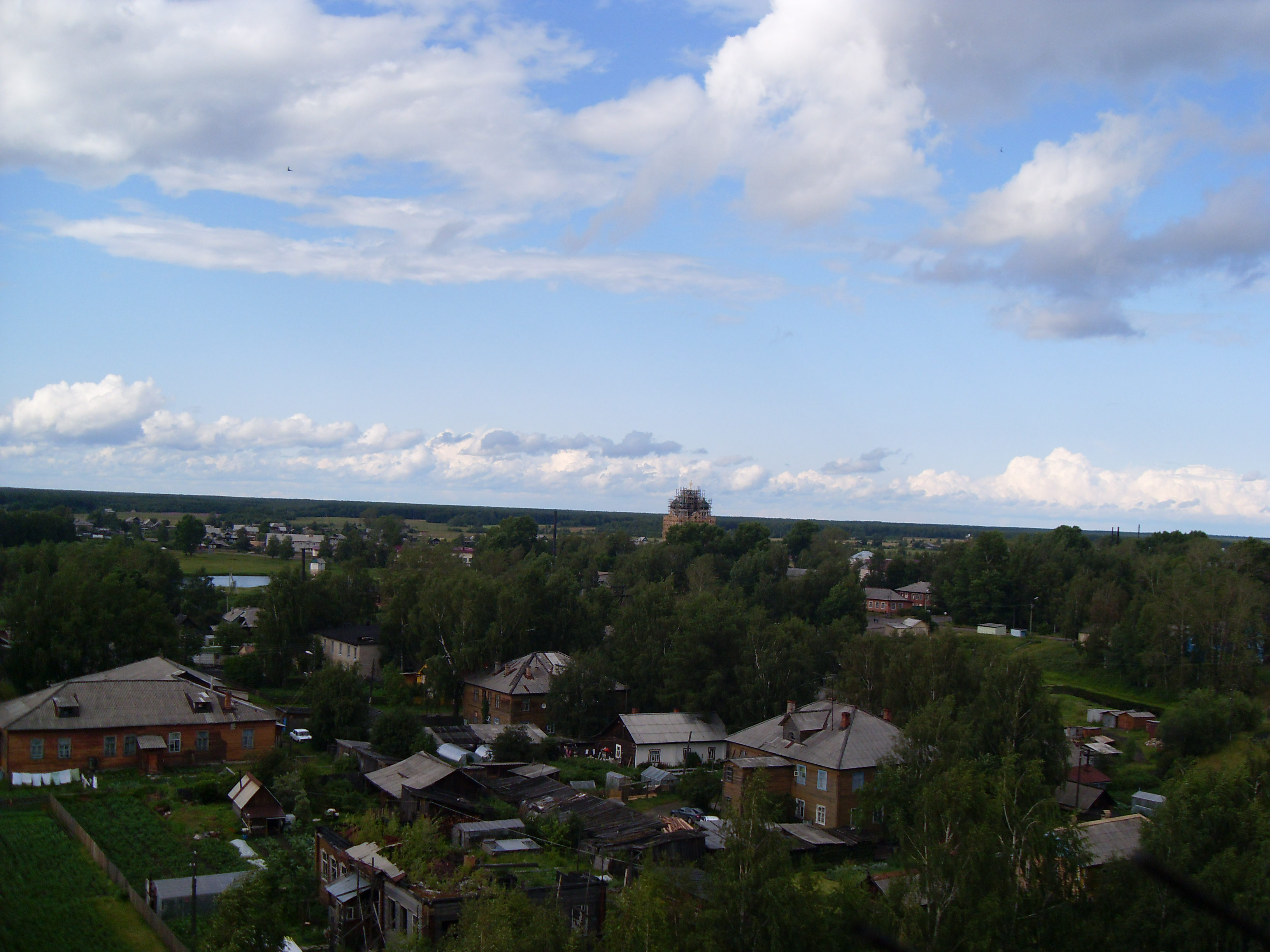 Сольвычегодск. Вид на северо-восток с колокольни Благовещенского собора